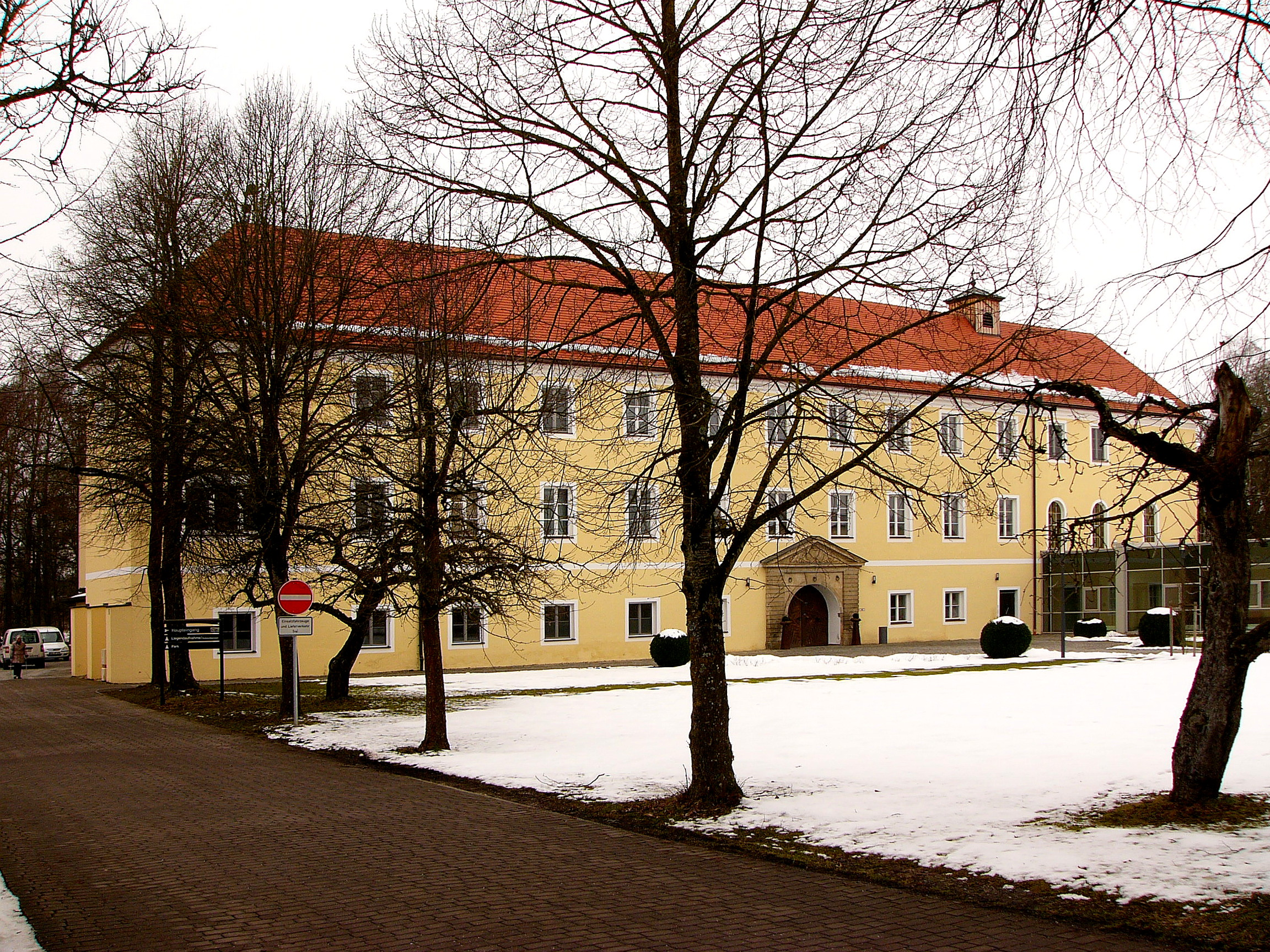 Ehemaliges Wasserschloss; jetzt Krankenhaus, Vierflügelanlage, dreigeschossig, mit Walmdächern, Nordflügel beiderseits ausspringend, um 1720/30, mit Hauskapelle; mit Ausstattung; Pavillon, offene Holzkonstruktion mit Kuppeldach, wohl um 1900; Reste des Wassergrabens als Weiher vorhanden.This is a photograph of an architectural monument.